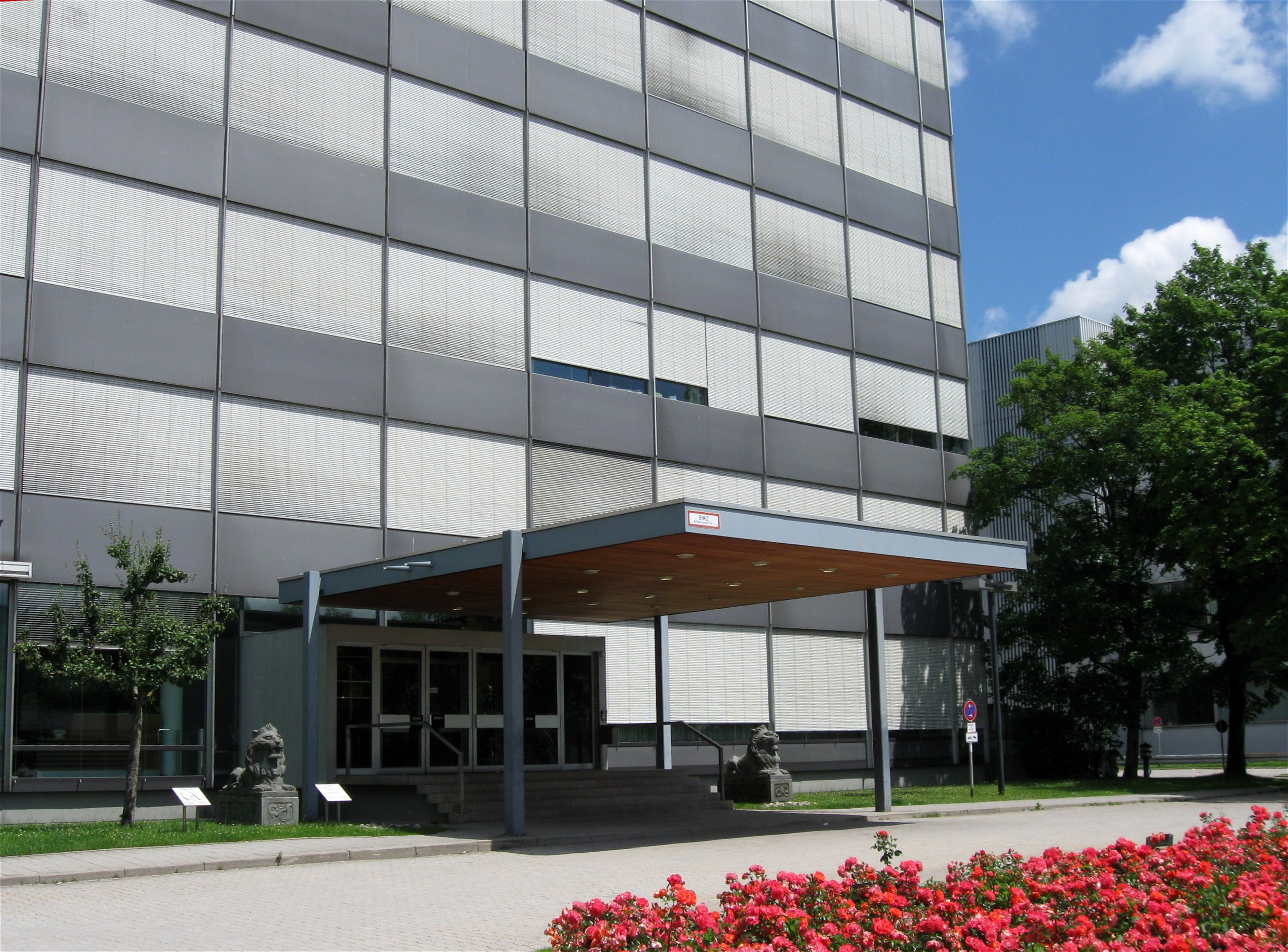 Hellabrunner Straße 1; Verwaltungsgebäude der Osram GmbH, kubischer, sechsgeschossiger Stahlskelettbau über quadratischem Grundriss, mit zwei Verkehrs- und Installationskernen aus Ortbeton; Aluminium-Glas-Vorhangfassade von äußerster Schlichtheit und Rationalität; Großraumbüros mit Vollklimatisierung; Eingangs-Vordach auf Stützen; 1963-65 von Walter Henn unter Mitarbeit von Dieter Ströbel als in Deutschland frühes Beispiel eines Großraum-Verwaltungsbaus errichtet; Foyer mit Glasprismenwand von A. F. Gangkofner und Holzintarsienwand von F. Stelzig.